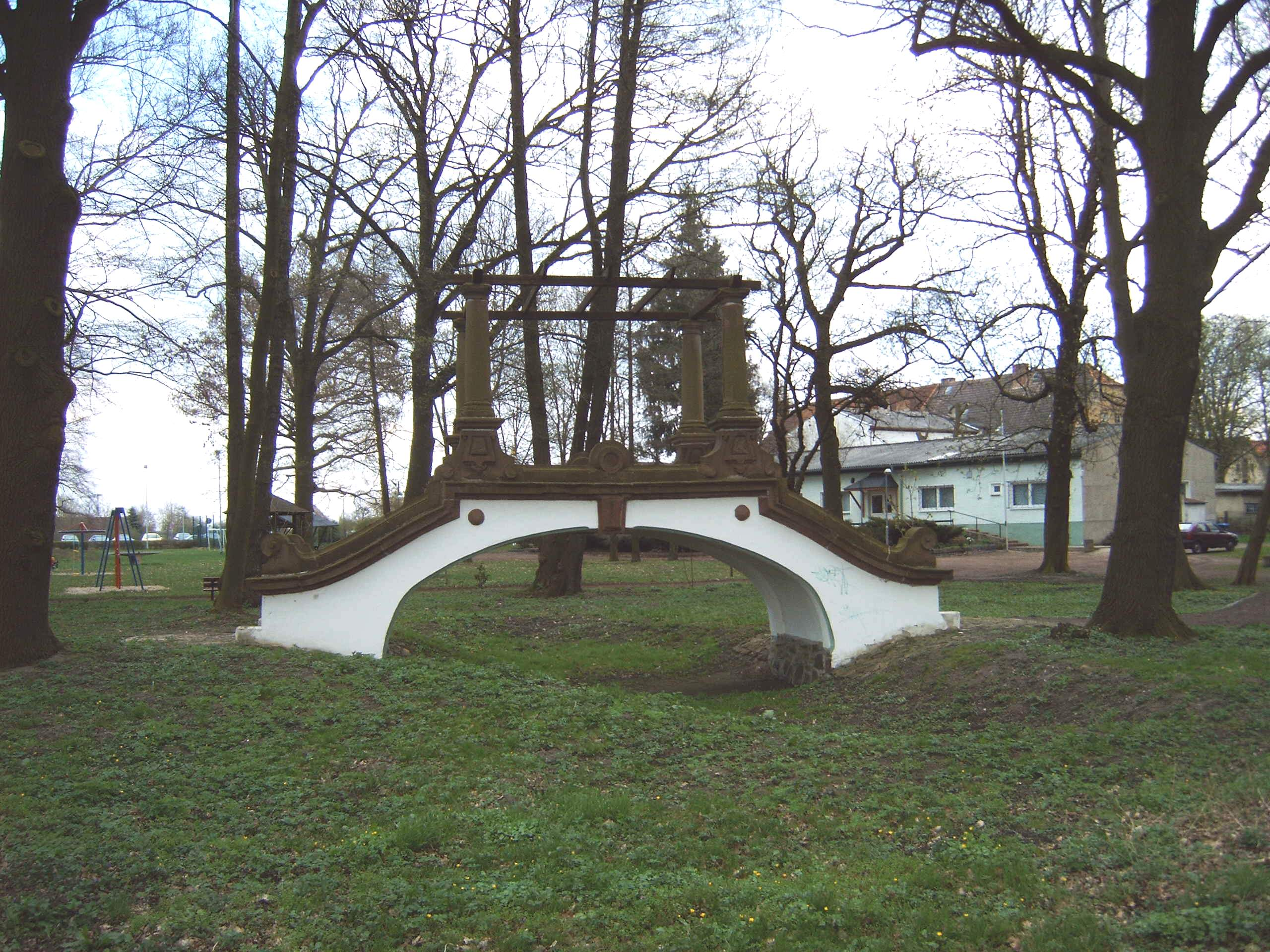 Dombrücke im Pöthener Park, Pöthen, Gommern, Deutschland Bild aufgenommen am 22.4.2006 von Olaf Meister